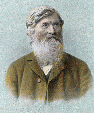 Diese Lithographie mit einem Gruß vom Benther Berg bei Hannover und dem Gastromom Ernst Rehbock vertrieb der '"Verlag Hartwig & Vogel's Automaten, Berlin um 1900 ...